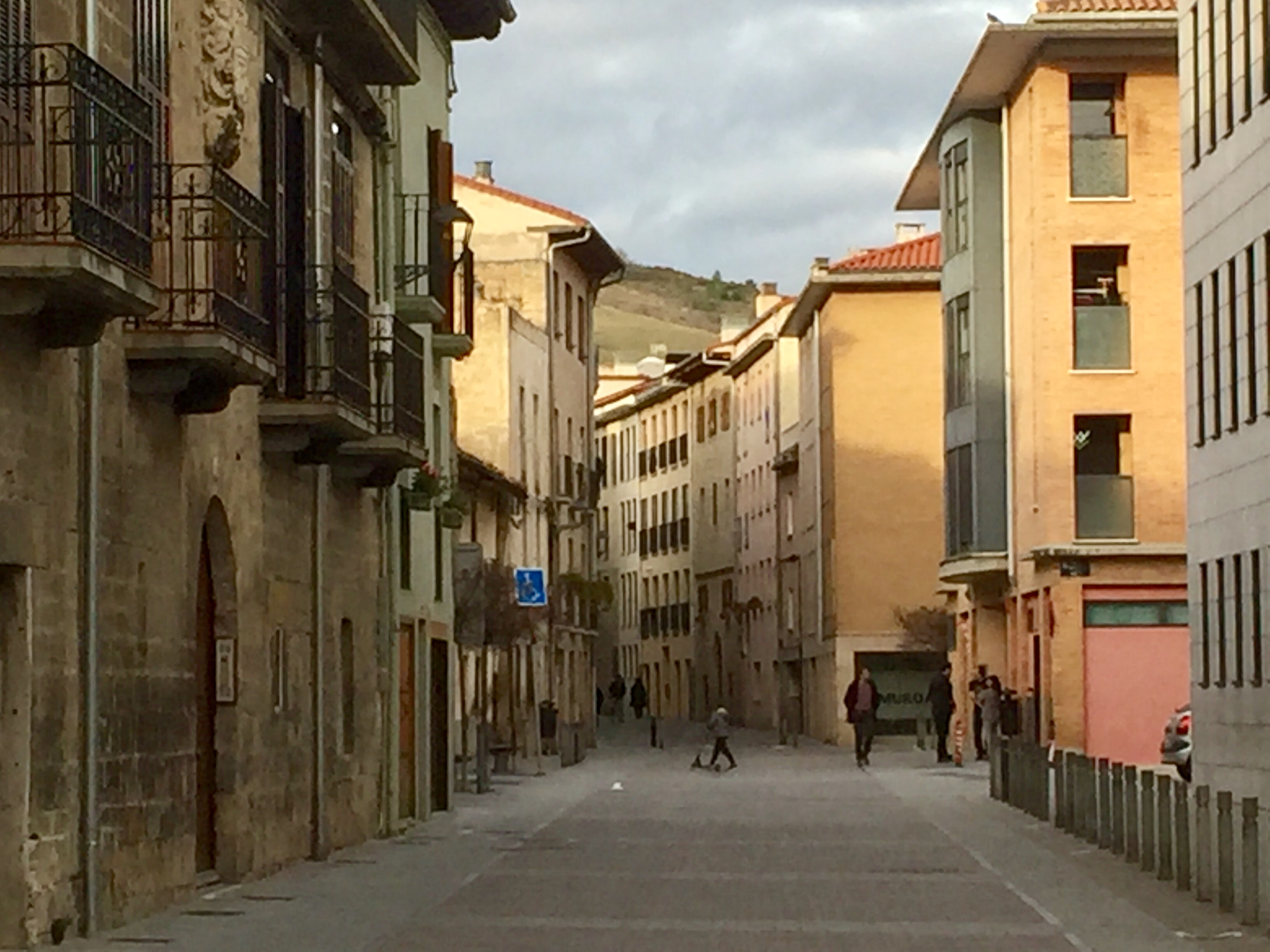 Atarrabia Nafarroan